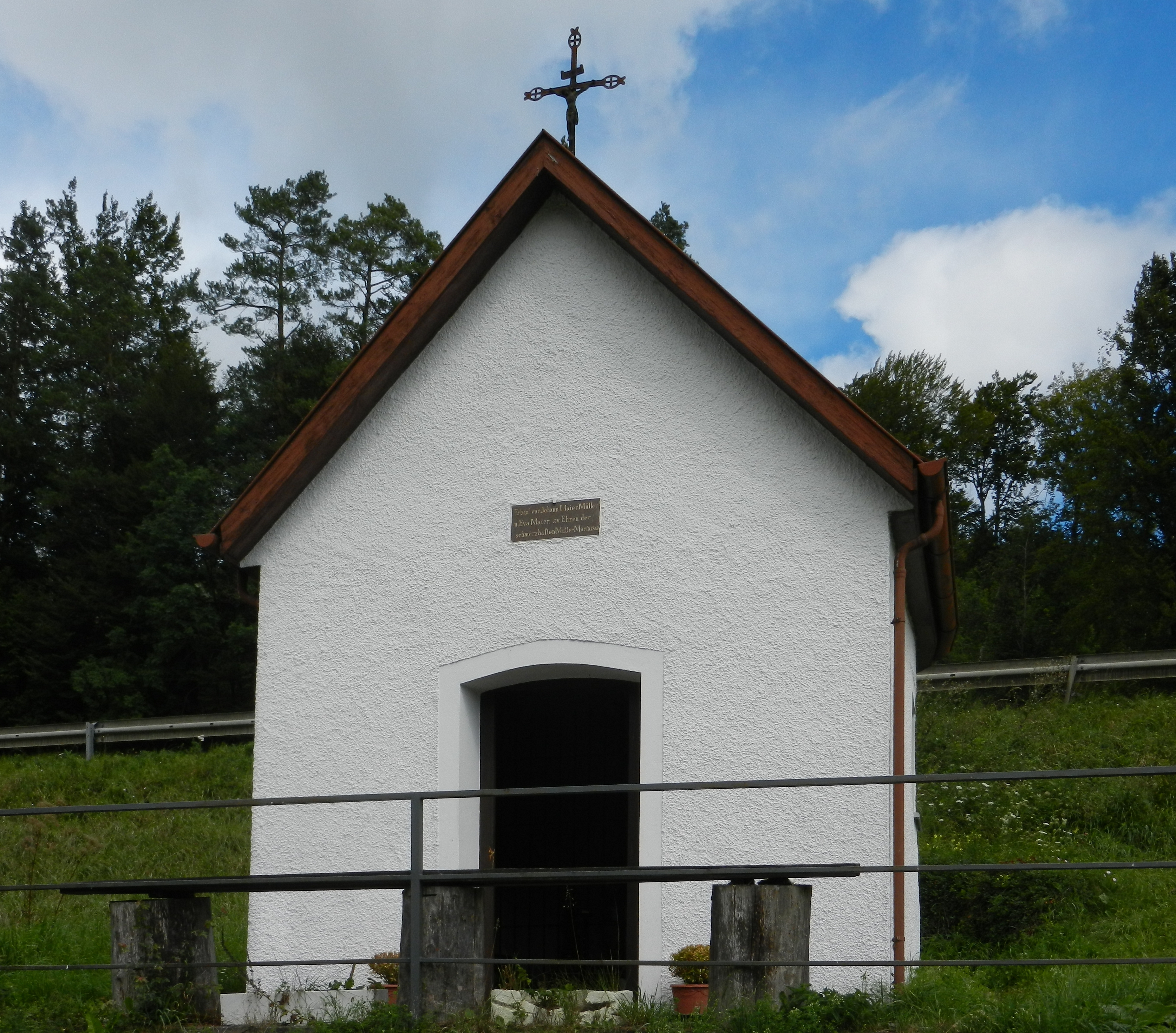 Die Kapelle bei der Walzmühle bei Burladingen an der Lauchert